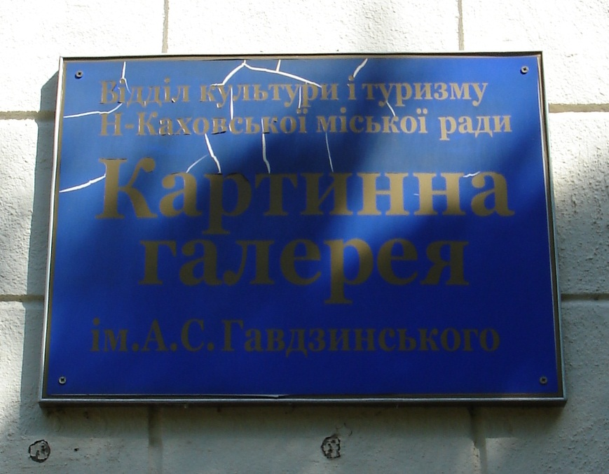 Табличка на стене музея в Новой Каховке